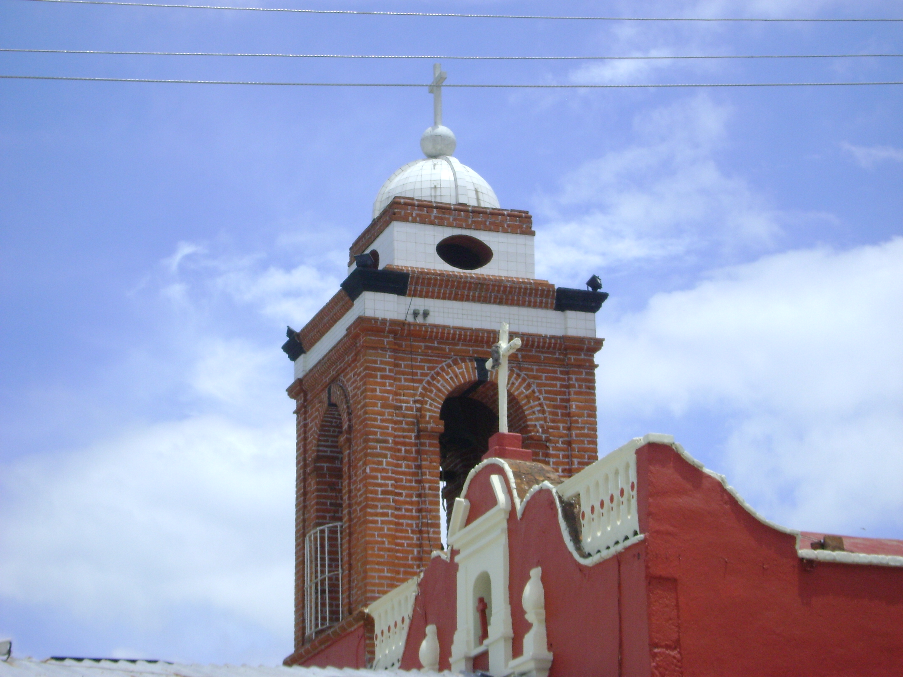 Esta capilla edificada en el siglo XVII se situa en en el barrio de Santiago al oriente del municipio